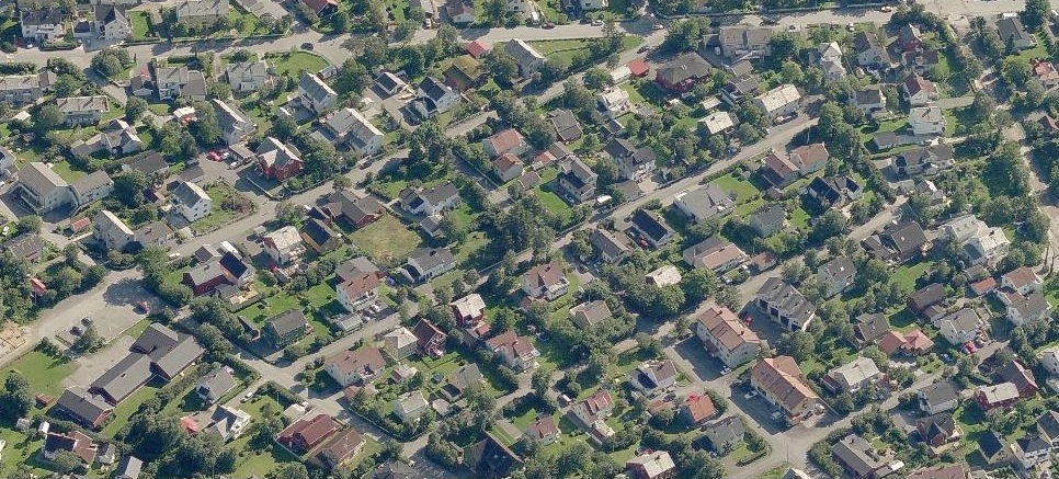 Dette er et bilde av Myrvoll, i Rønvika, Bodø. Jeg har selv tatt bildet fra en helikoptertur over byen.